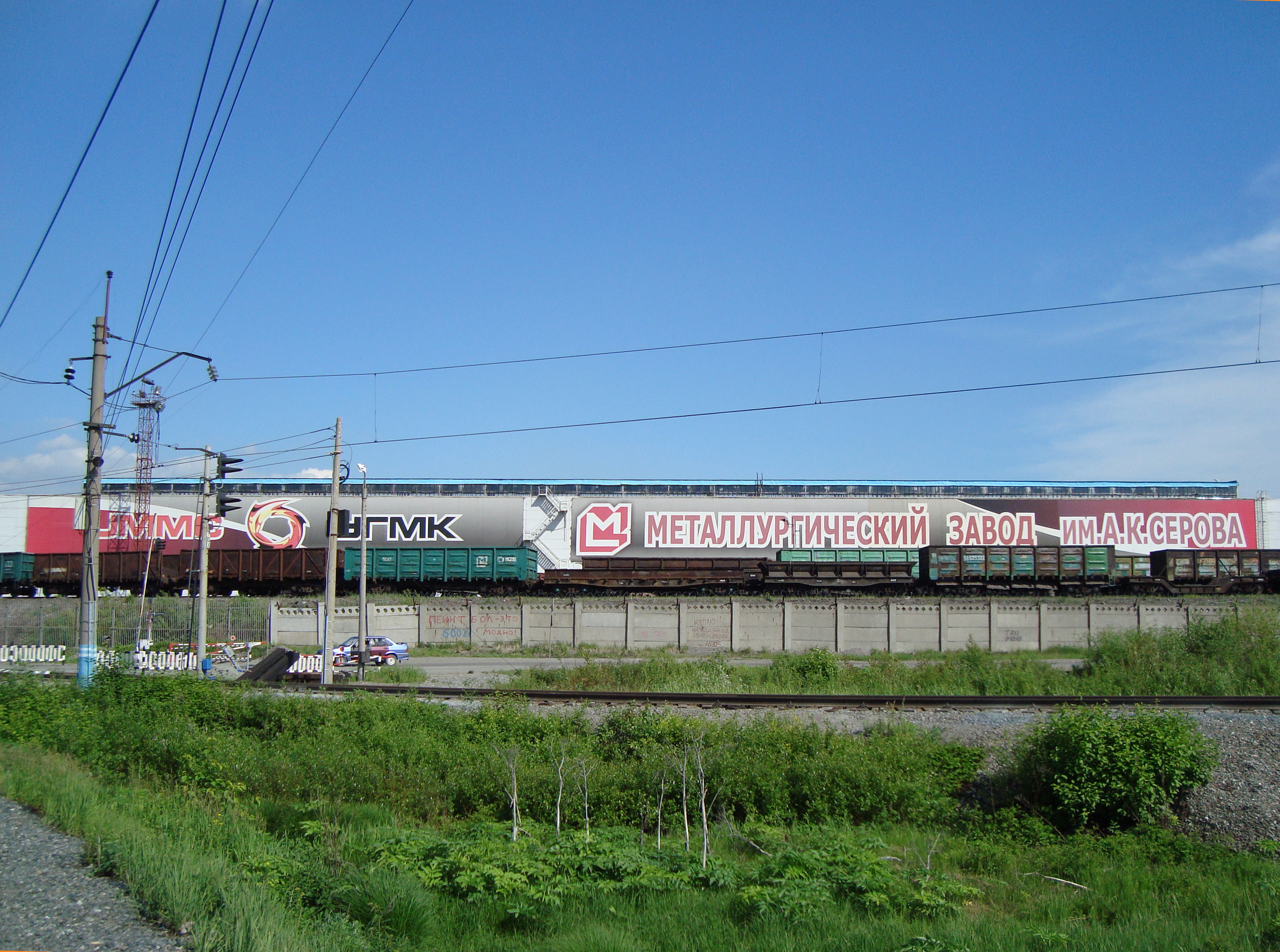 Металлургический завод им. А. К. Серова с восточной стороны